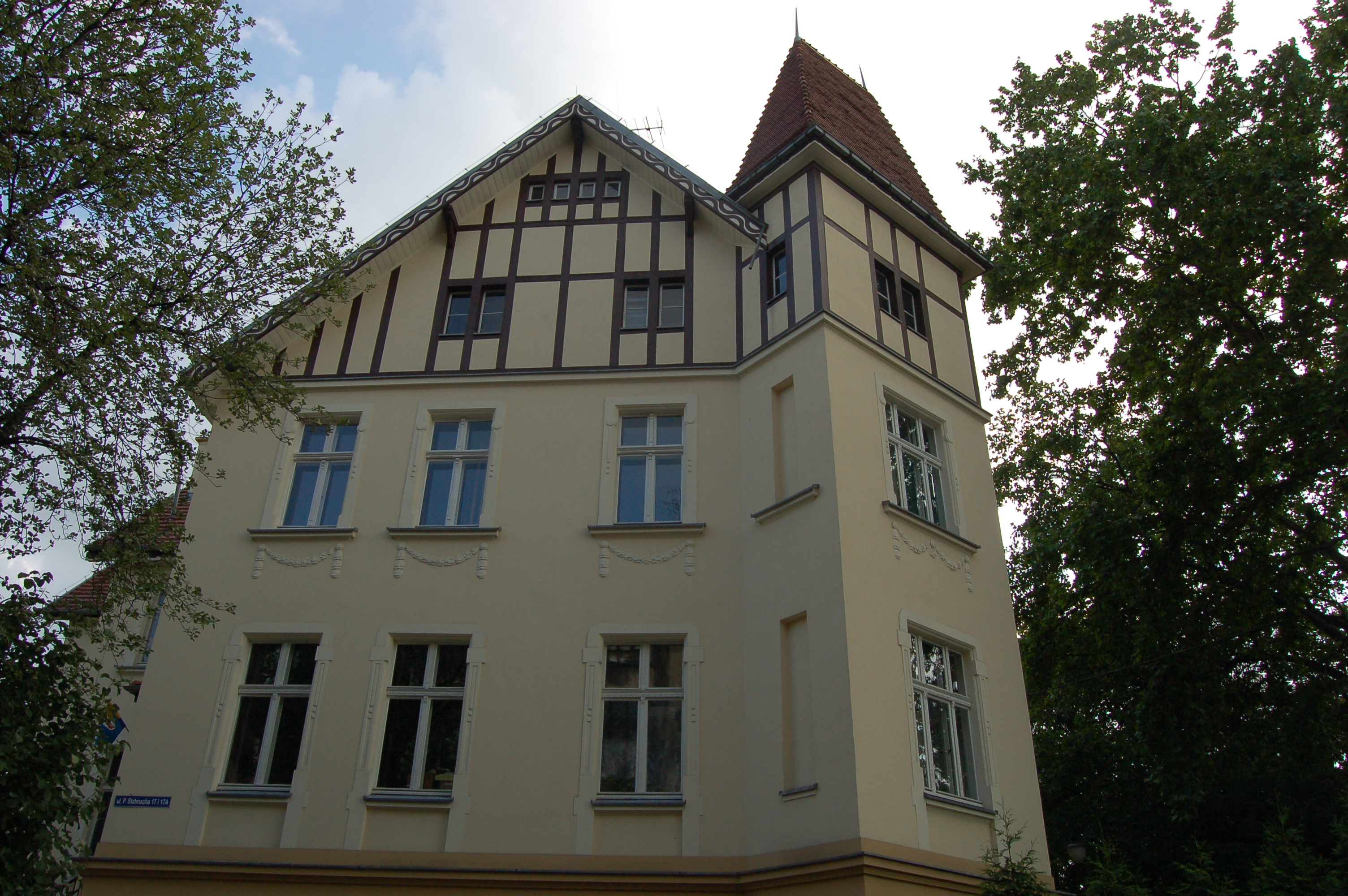 Katowice, ul. P. Stalmacha 17 - tzw. willa Adama Kocura została wzniesiona w 1924 według projektu budowniczego Zfimermanna; w stylu eklektyzmu, łączącego elementy historyzmu i modernizmu. Pierwszy właściciel budynku odsprzedał go władzom miasta. W willi zamieszkał ówczesny prezydent Katowic − Adam Kocur. Po II wojnie światowej nocowali tu Nikita Chruszczow oraz Fidel Castro (zabytek nr A/1407/90 z 5.08.1990)